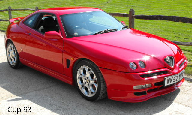 Alfa Romeo GTV 3.0 V6 24v Cup Ltd Edtn